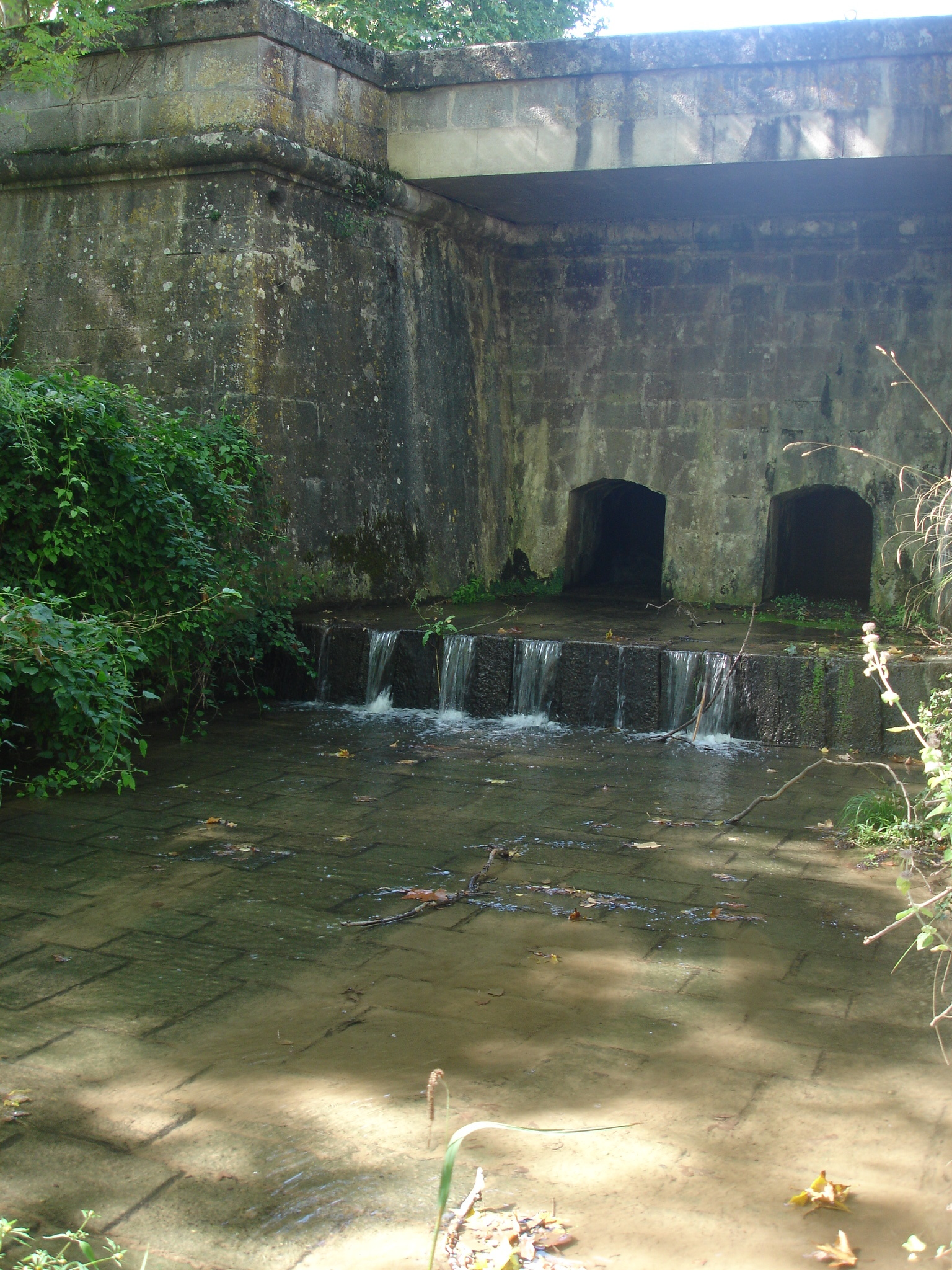 France, Aude (11), Seuil de Naurouze, épanchoir de Naurouze